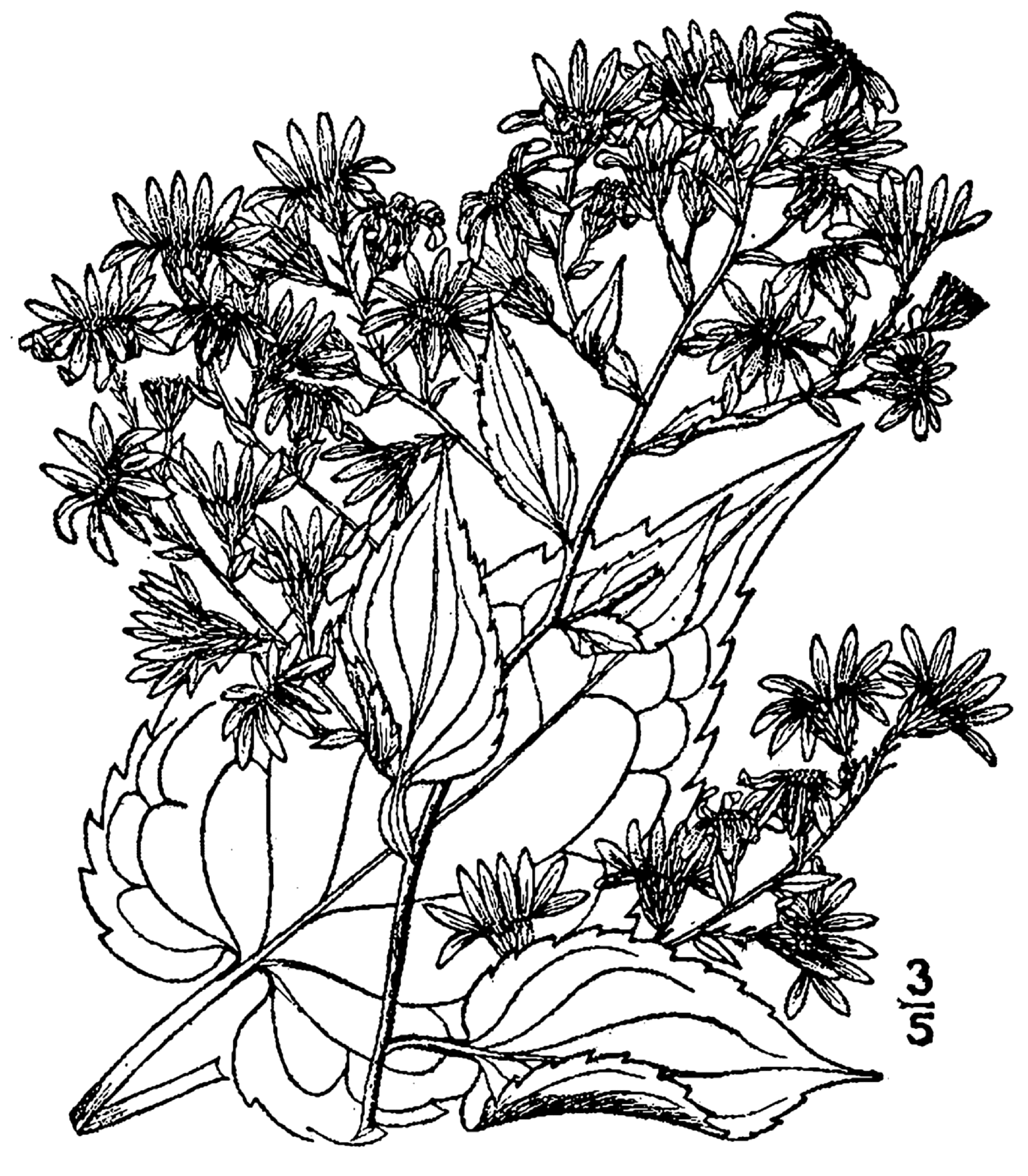 Aster cordifolius